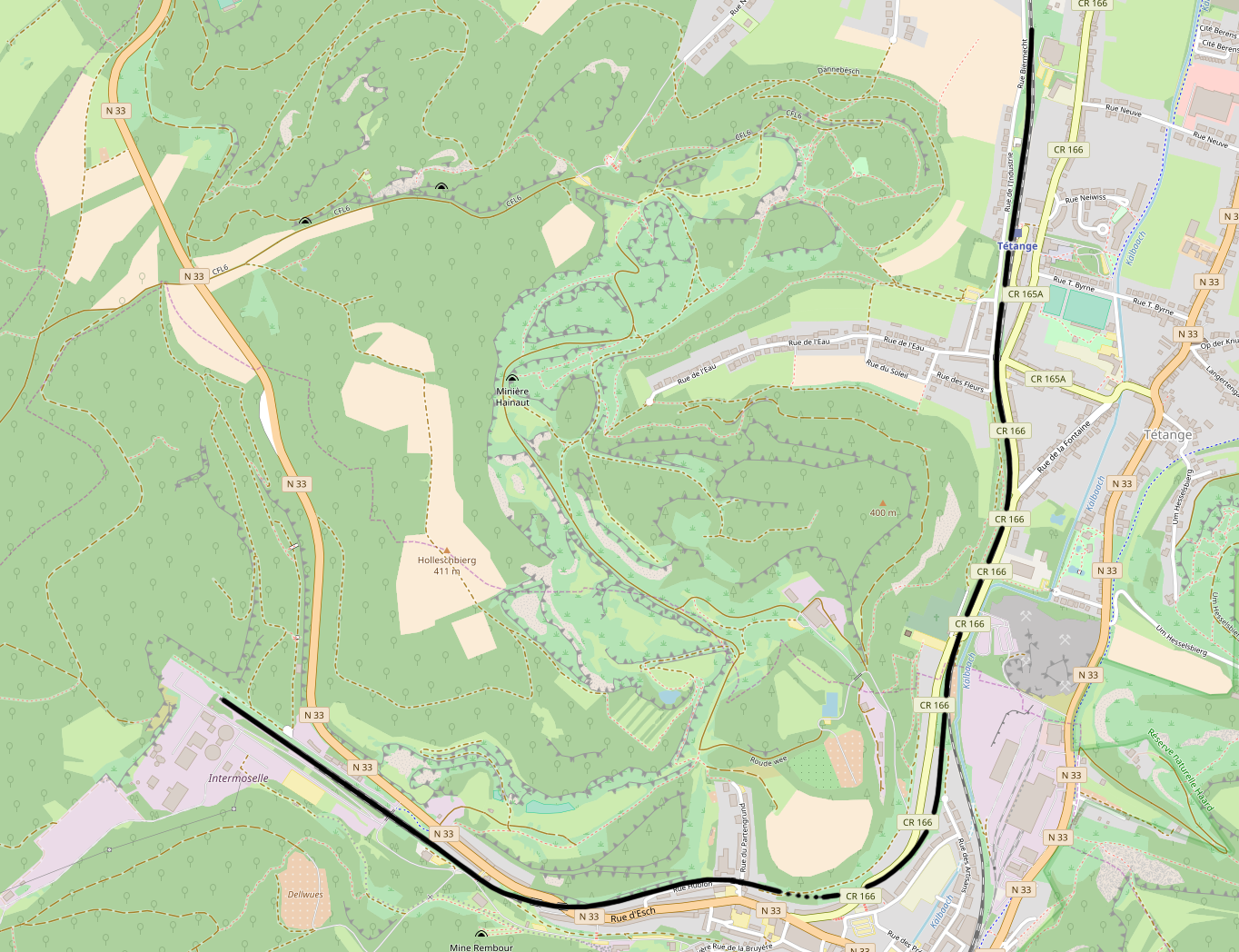 CFL line 6d, Tétange - Langengrund